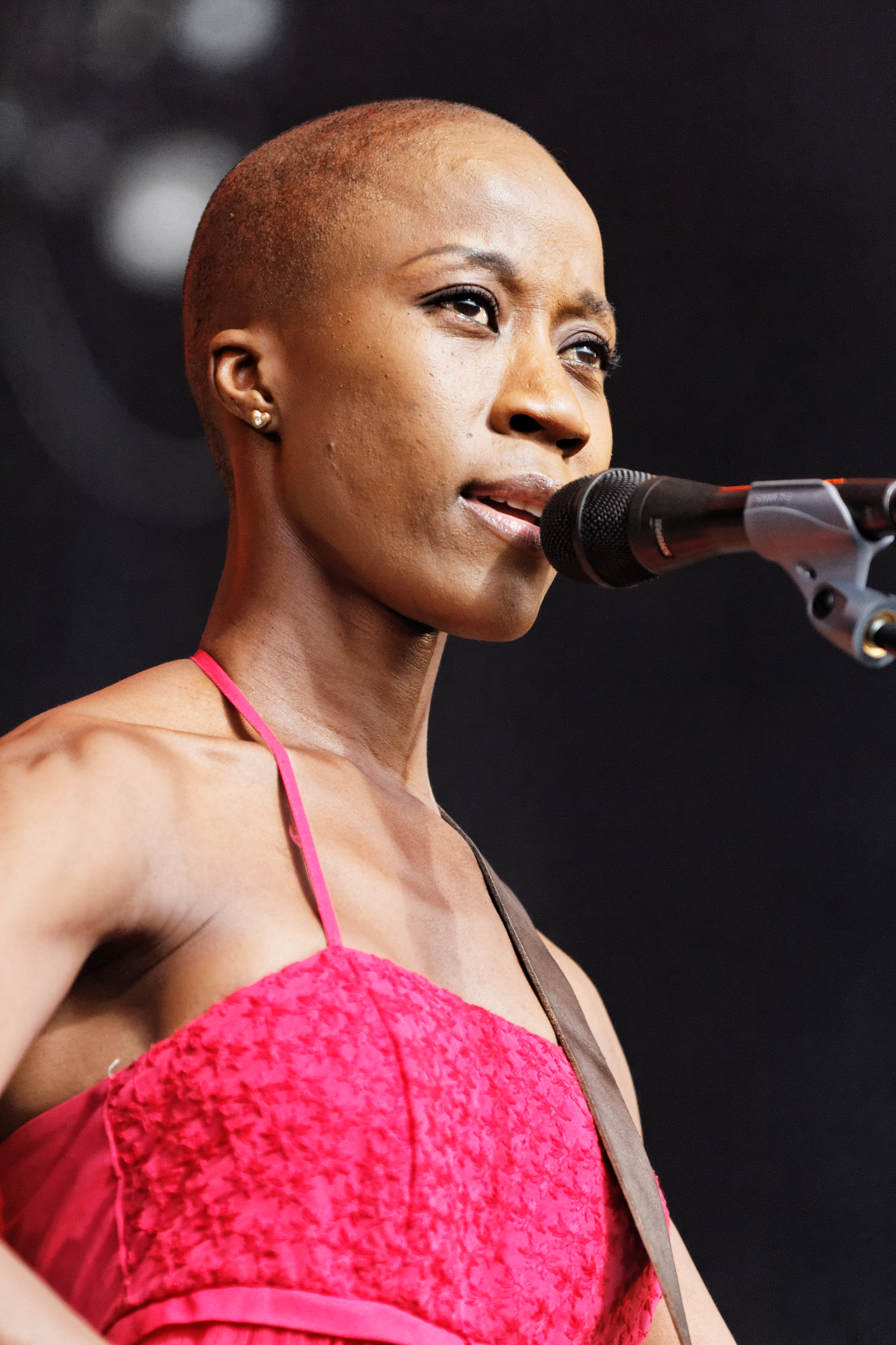 Rokia Traoré en concert sur la scène Landaoudec lors du festival du bout du Monde à Crozon dans le Finistère (France).